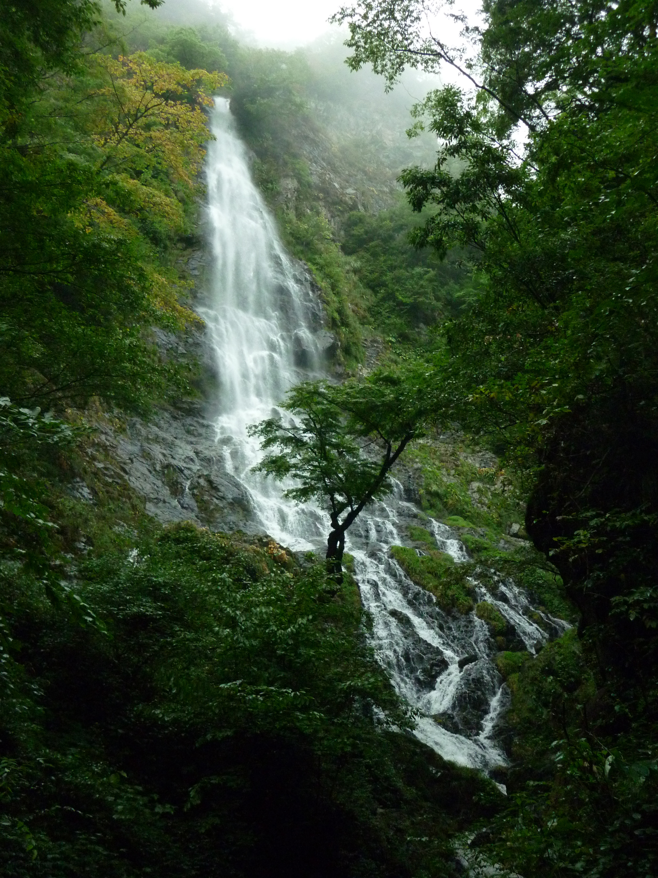 天滝の全景